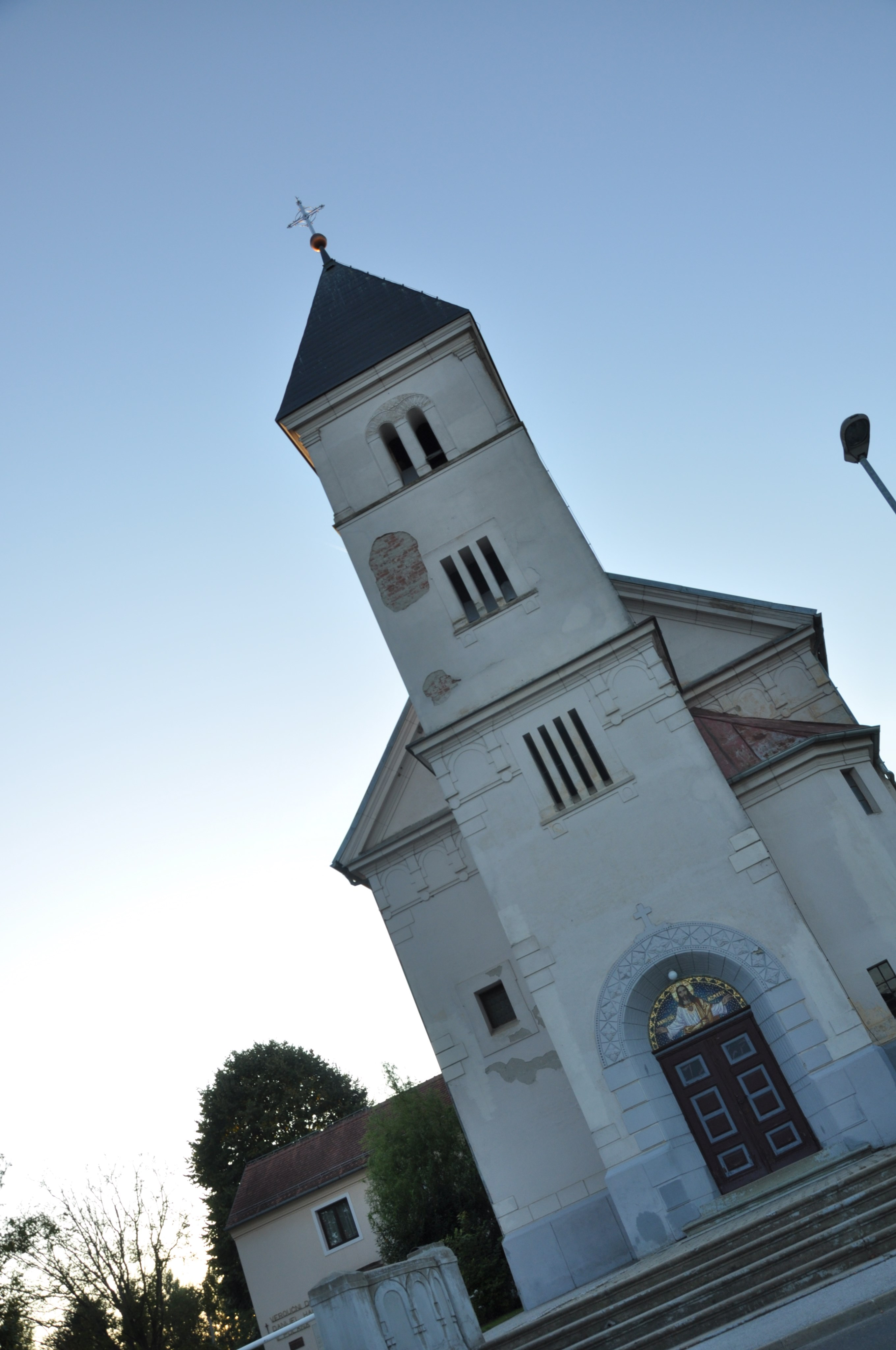 Cerkev, ki se nahaja v vasi Velika Polana. This media shows a cultural heritage object of Slovenia with the EŠD number: 1147